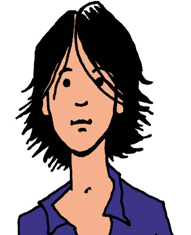 Rachel Gold, Selbstportrait